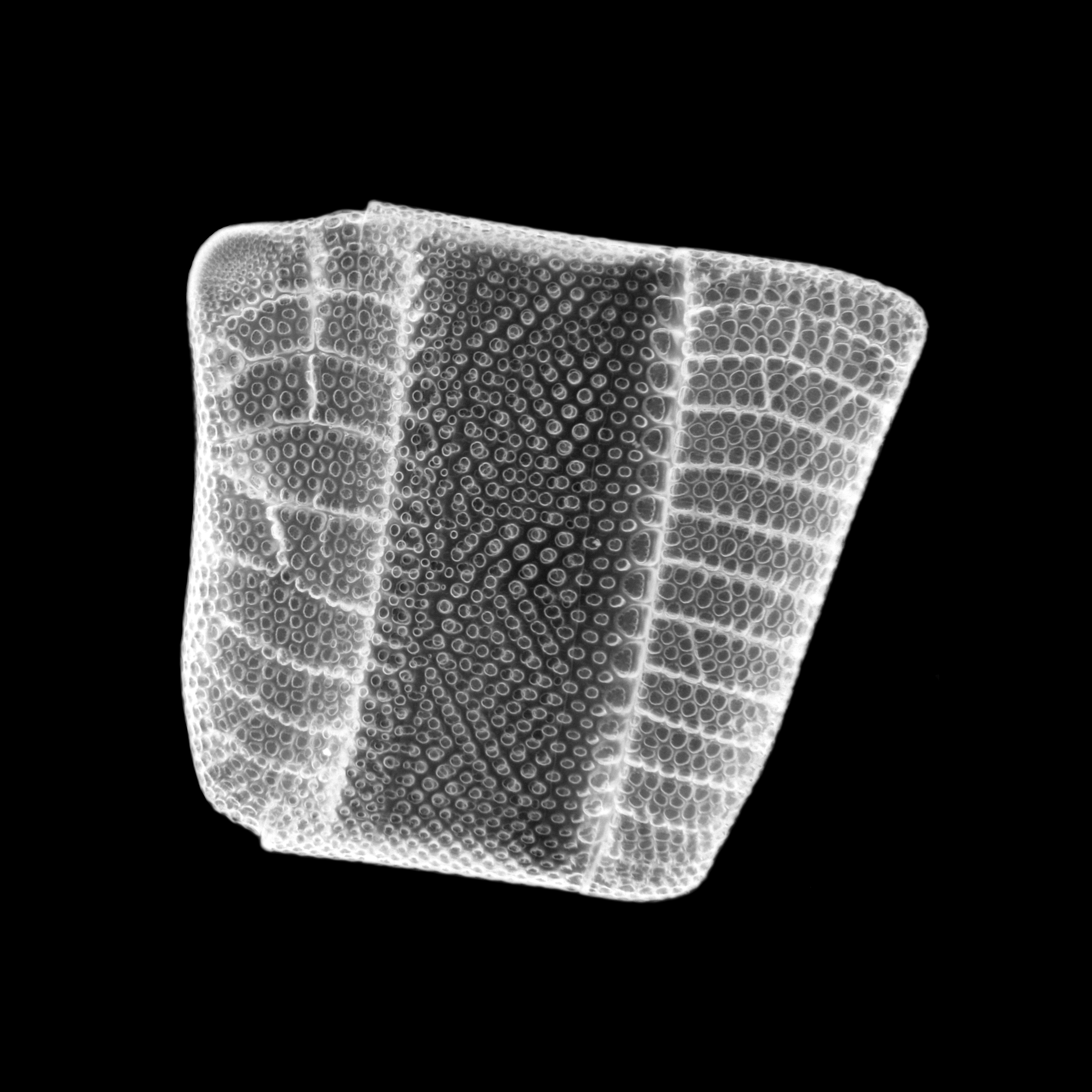 Fundort / Site: Golden Gardens Beach, Seattle (USA) Alter / Age: recent Präparation / Preparation: Anne Gleich Stacked image